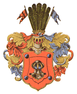 Vaakuna